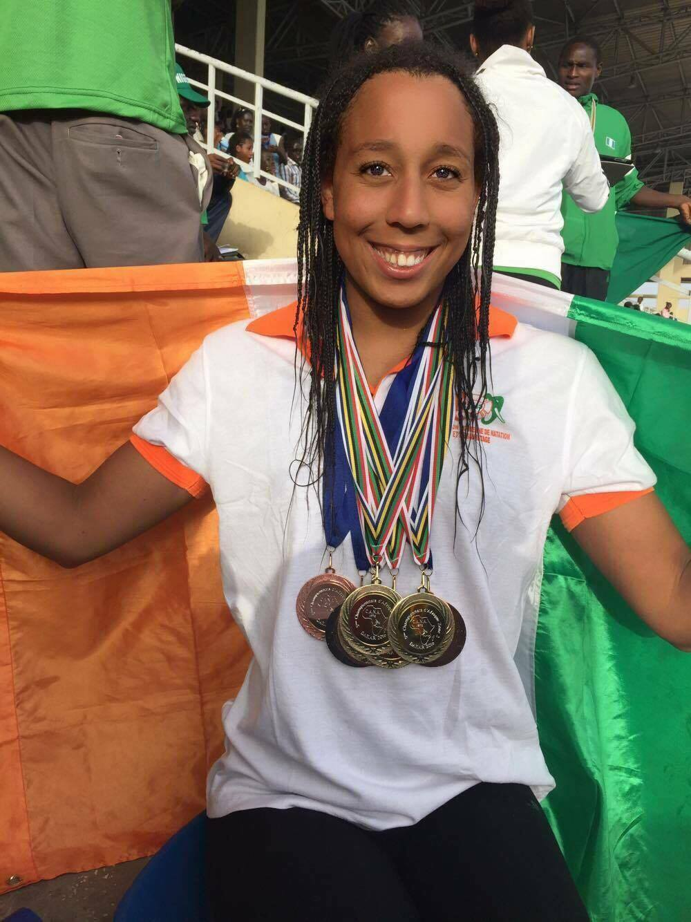 Talita Te Flan African Championships 2016 Dakar